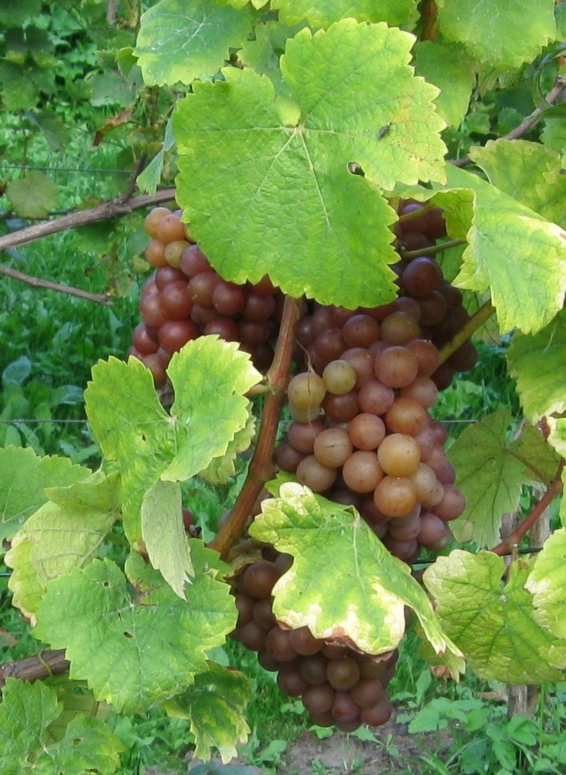 Winogrona siegerrebe